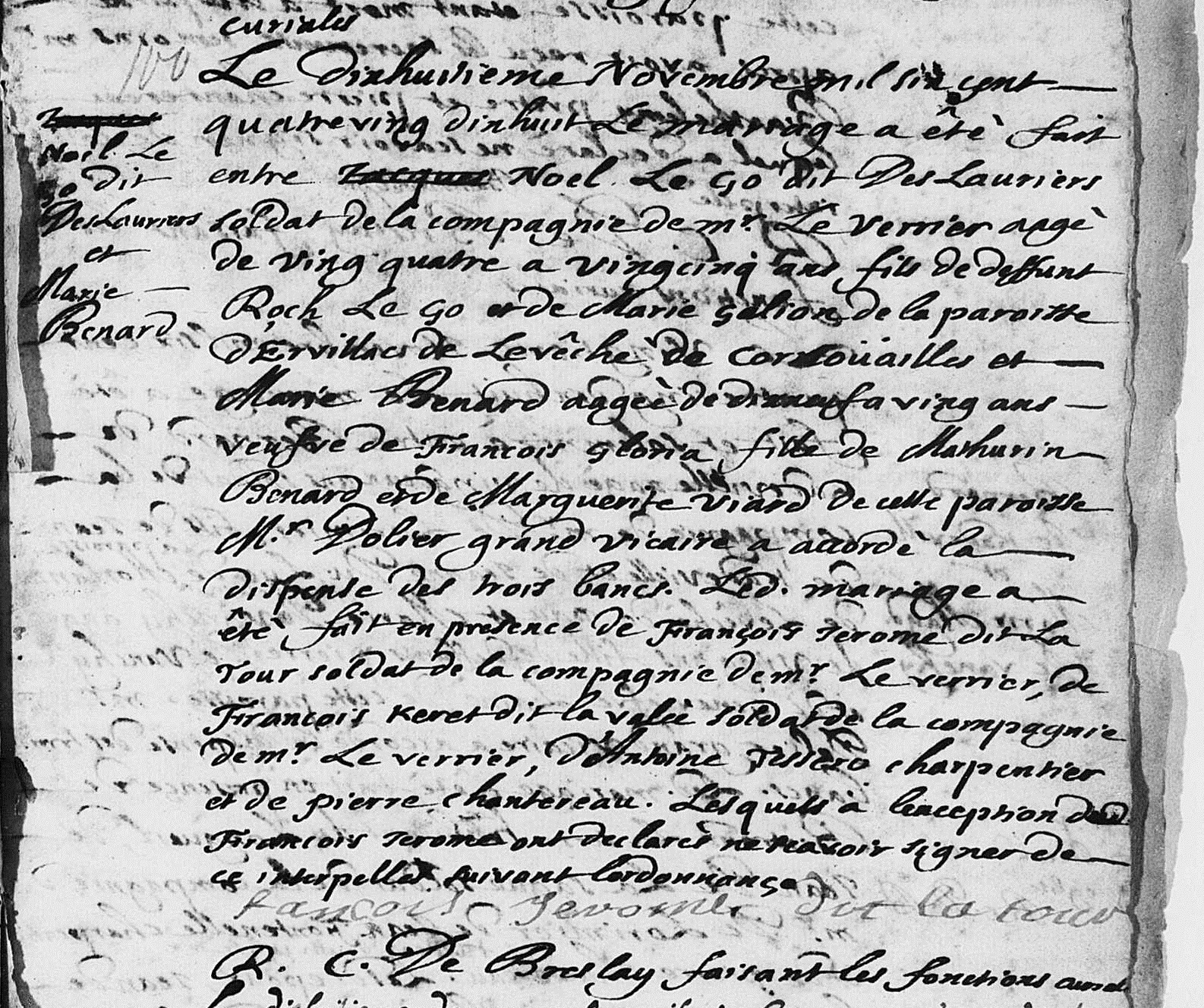 Acte du mariage de Noël Legault avec Marie Besnard le 18 novembre 1698 en l'église Notre-Dame de Montréal (Nouvelle-France).